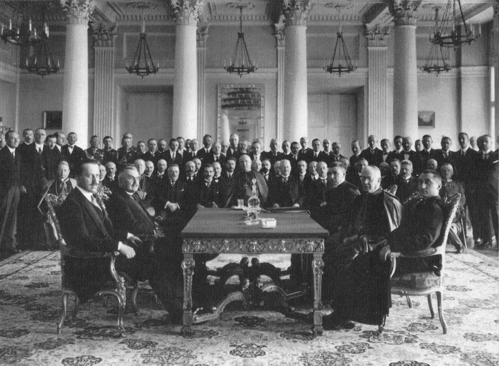 Podpisanie konkordatu między Stolicą Apostolską a Rzecząpospolitą Polską w Pałacu Rady Ministrów w Warszawie, 2 czerwca 1925